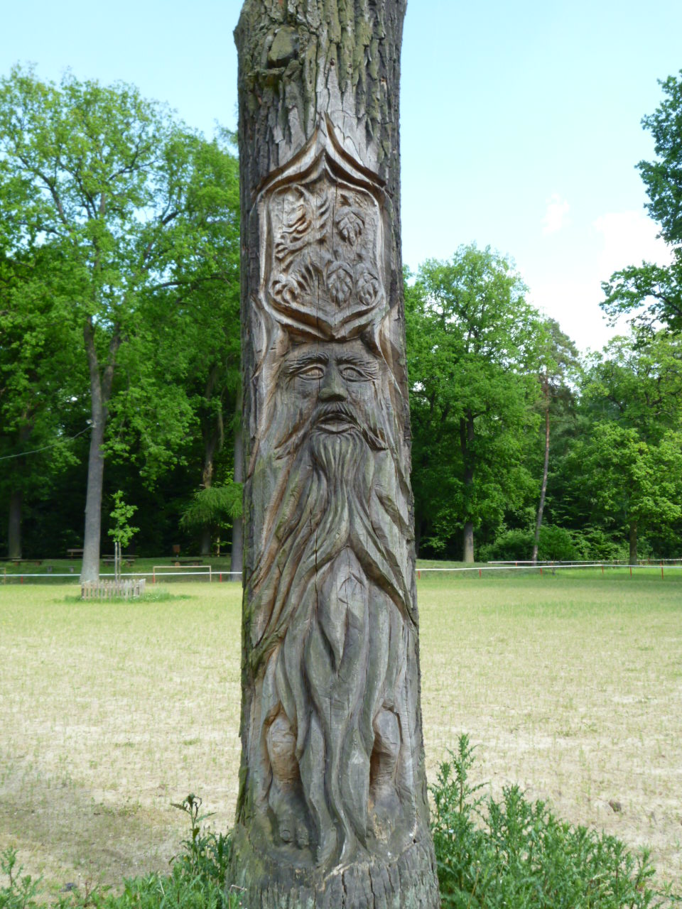 Calvörde-Grieps, Naherholungsgebiet Grieps, Pferdestadion, Schnitzerei, Wappen von Calvörde mit Zwerg